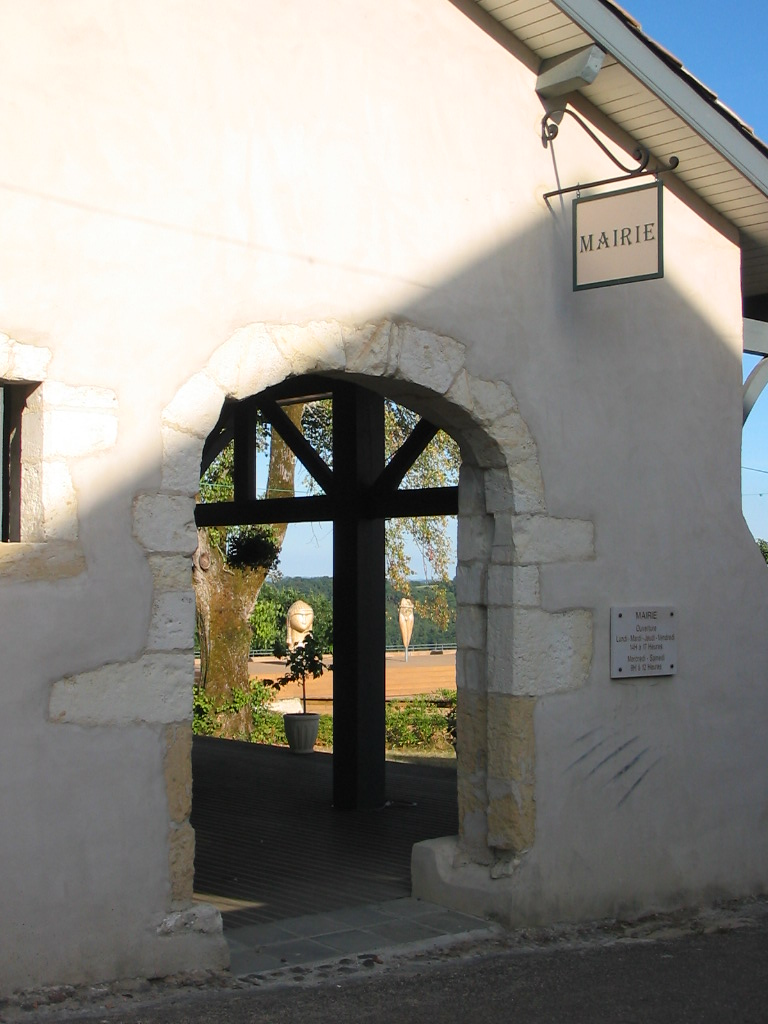 Brassempouy. Acceso a la Maison de la Dame desde el ayuntamiento. Museo y yacimiento se encuentran justo debajo de las réplicas gigantes de las figuras paleolíticas.